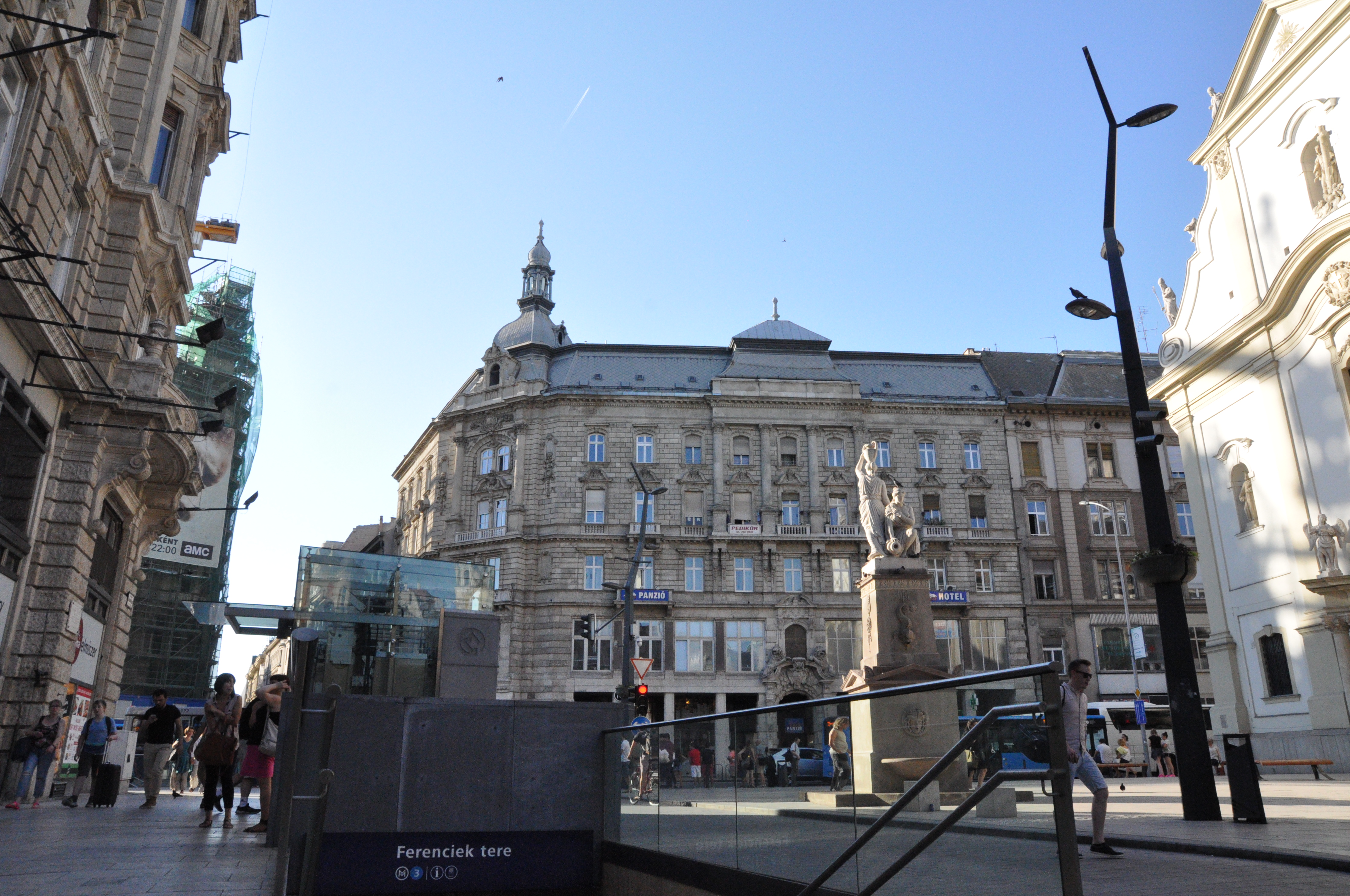 Budapest, Ferenciek tere